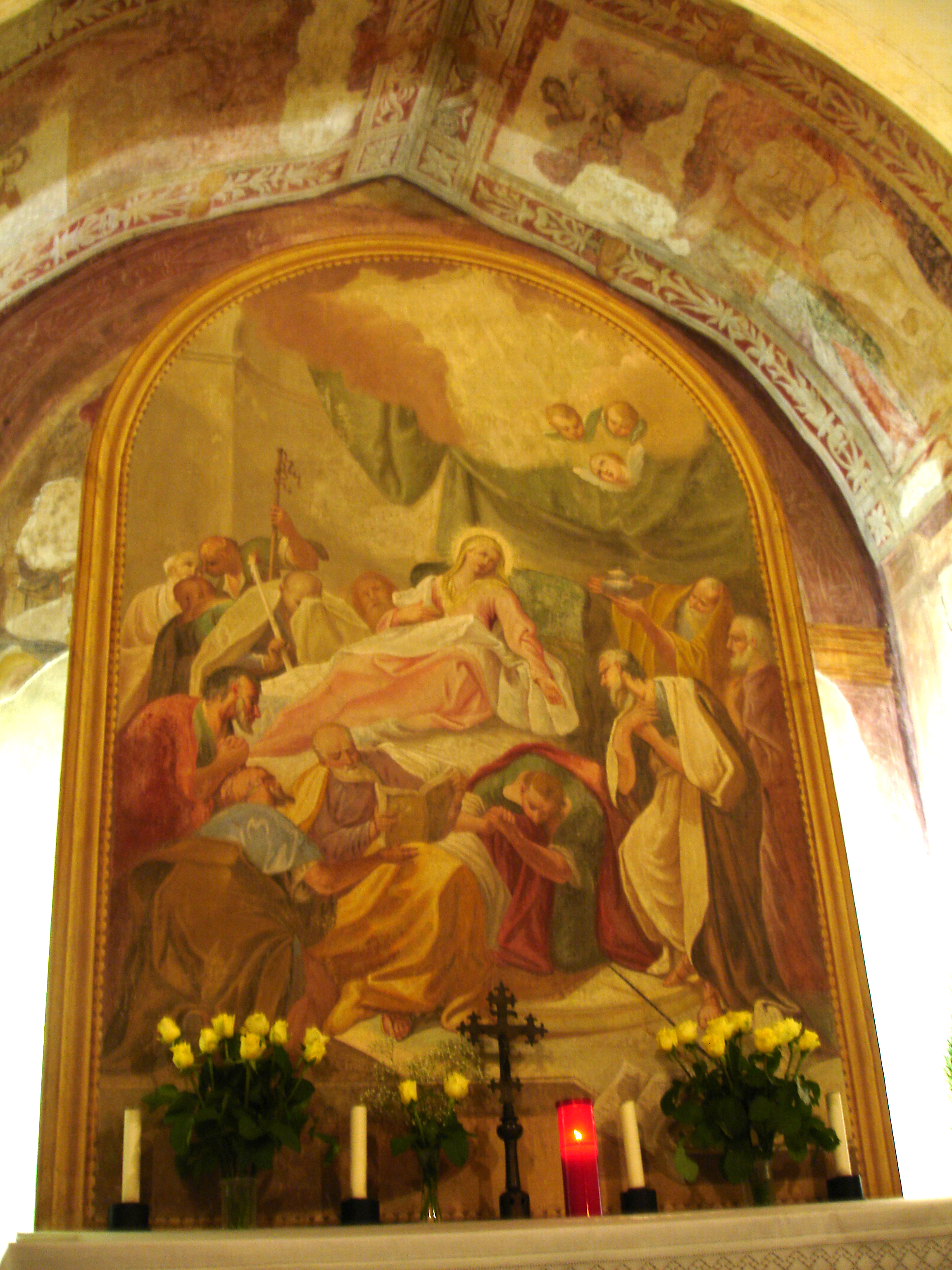 Oratorio di Santa Maria in Valle (Madonna della Salute) This is a photo of a monument which is part of cultural heritage of Italy.